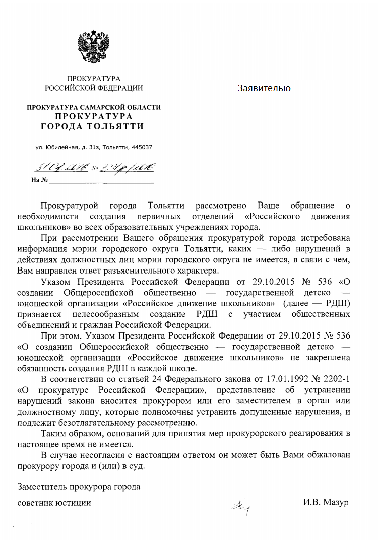 Разъяснение прокурора об Указе Президента РФ "О Российском движении школьников" в котором не сказано что первичные отделения движения обязаны быть в каждой школе.